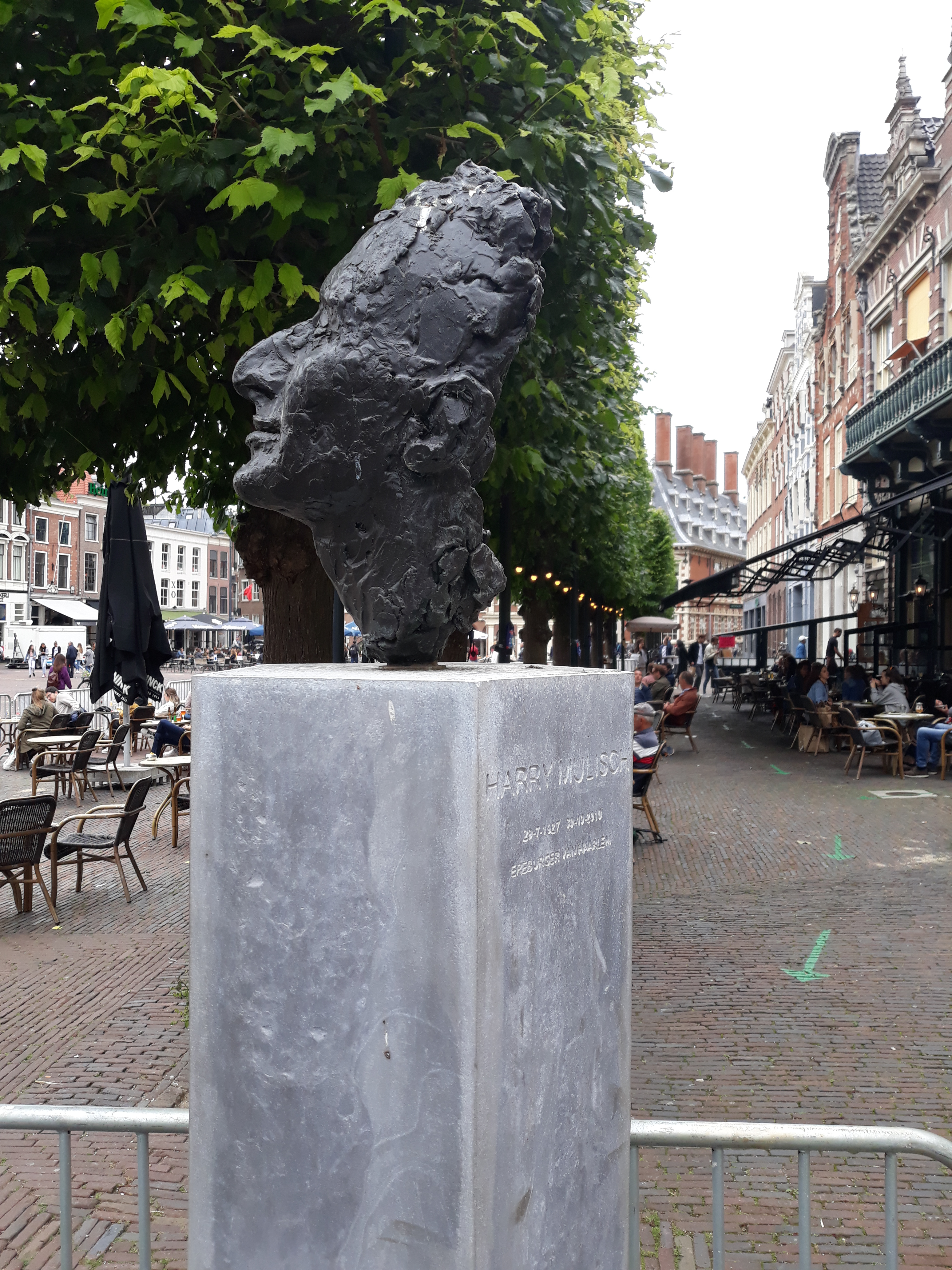 Büste des niederländischen Schriftstellers Harry Mulisch auf dem Großen Marktplatz von Haarlem.